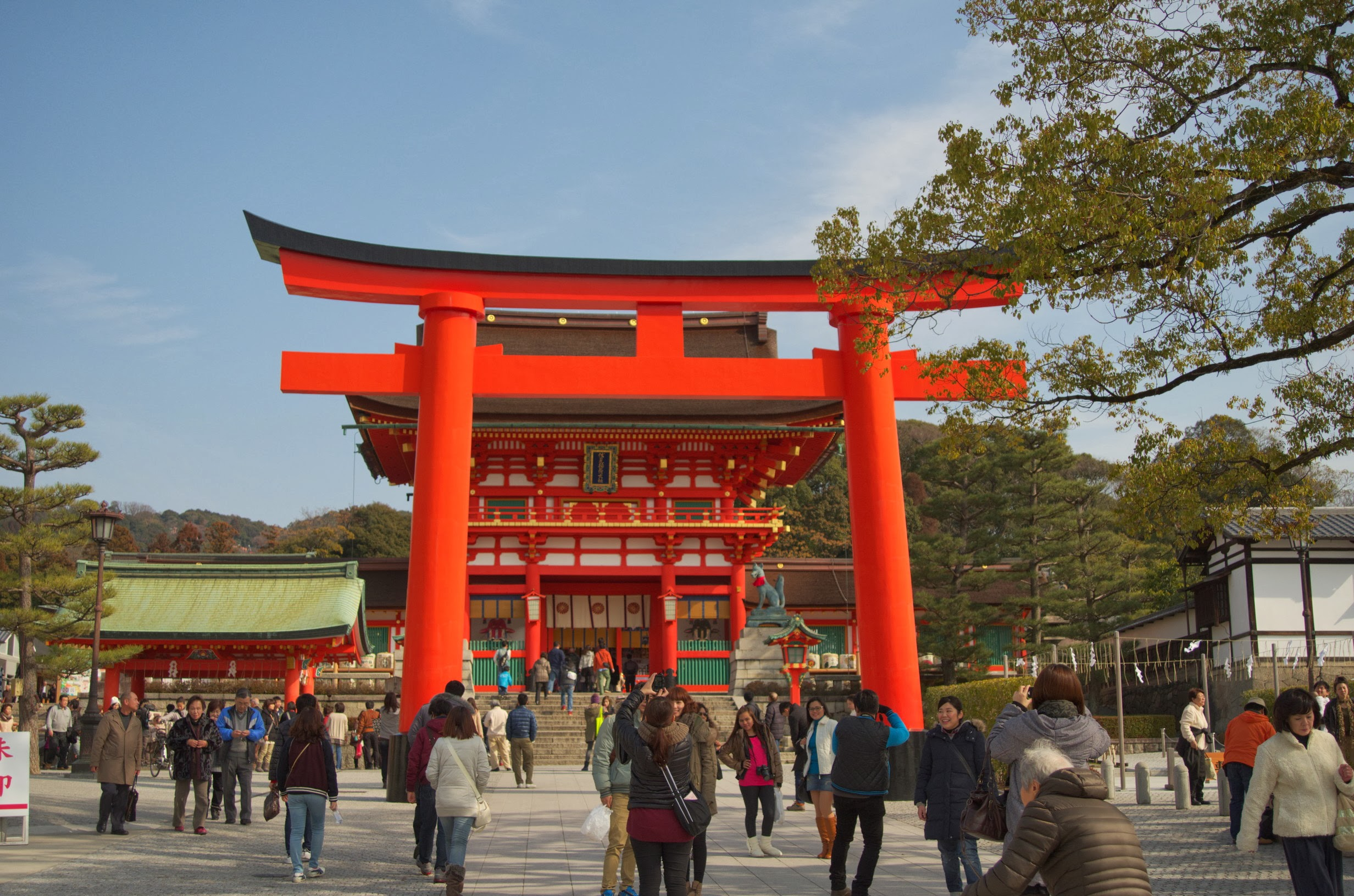 Fushimi Inari Grand Shrine / 伏見稲荷大社